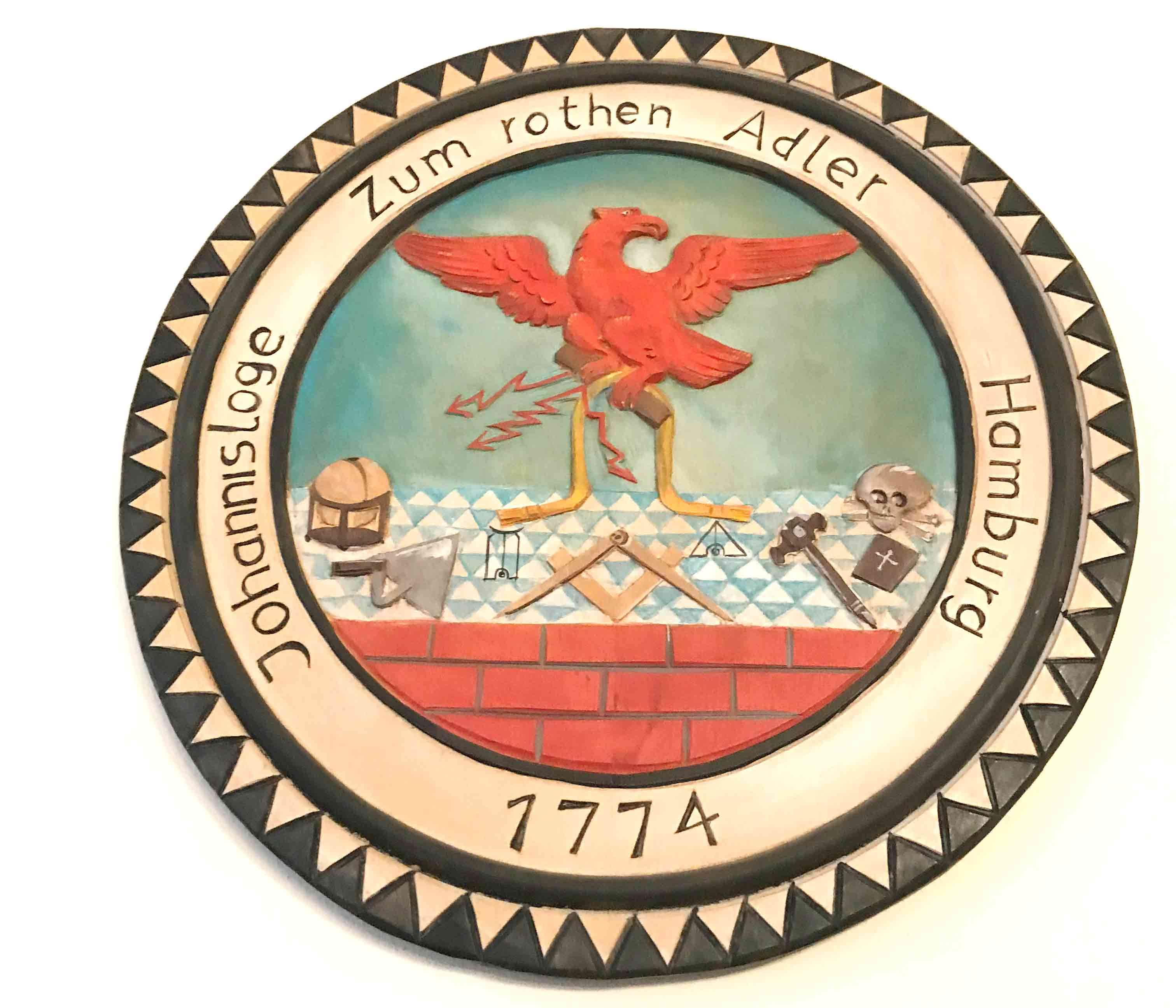 Wandwappen der Johannis-Loge „Zum rothen Adler“